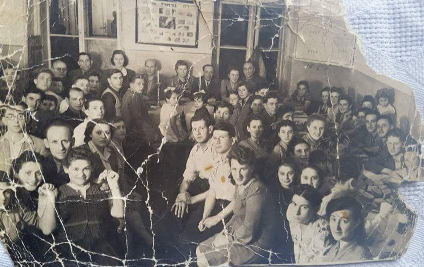 הכשרה בגורדוניה בפולין, ערב שבת לקראת העליה לארץ ישראל ב-1947